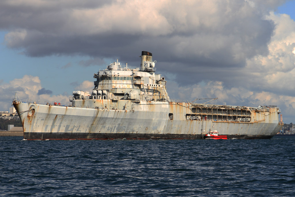 Dernier voyage de la Jeanne d'Arc, départ de Brest le 11 octobre 2014.